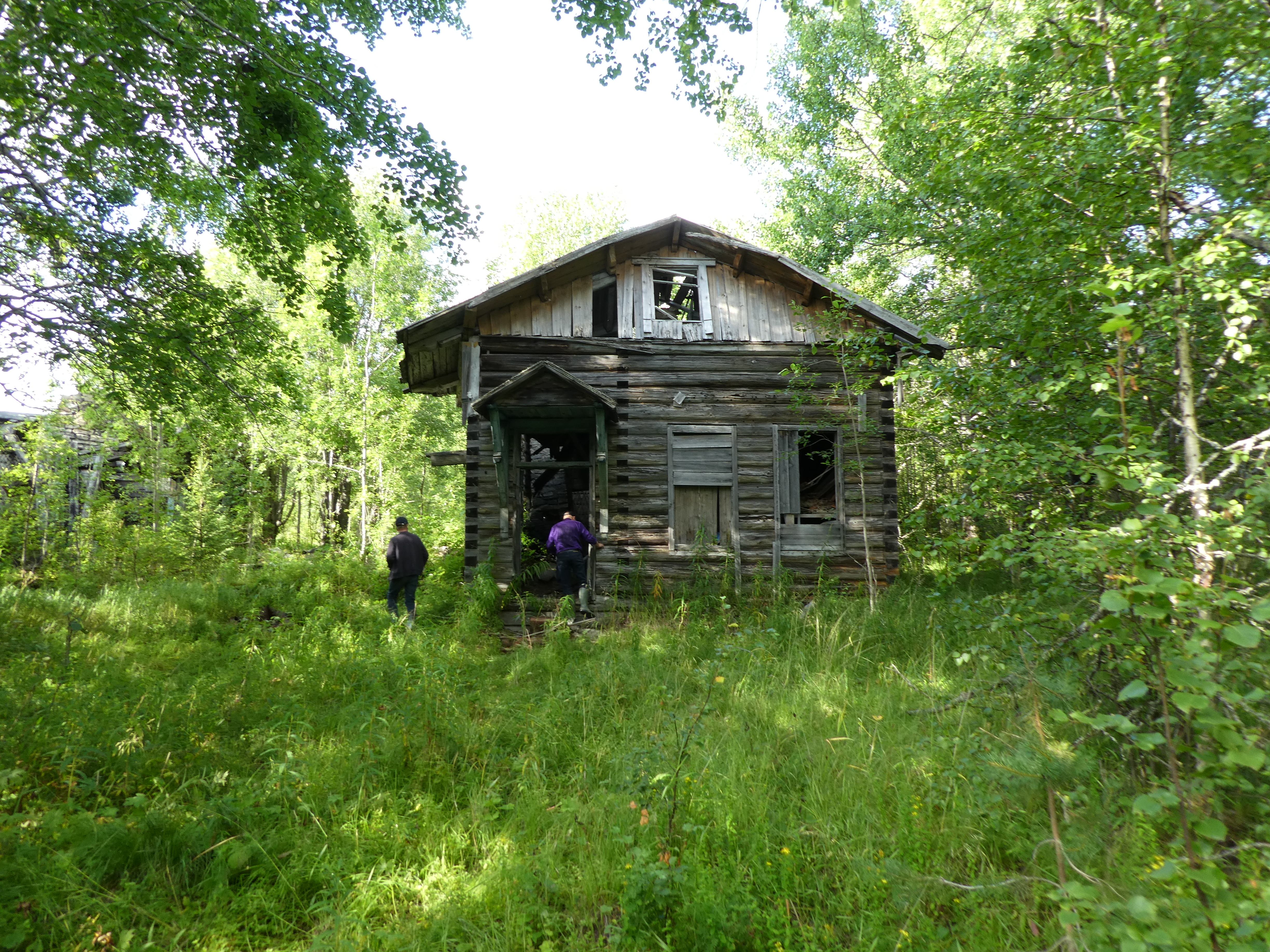 rakennelma on Venäjän puolella